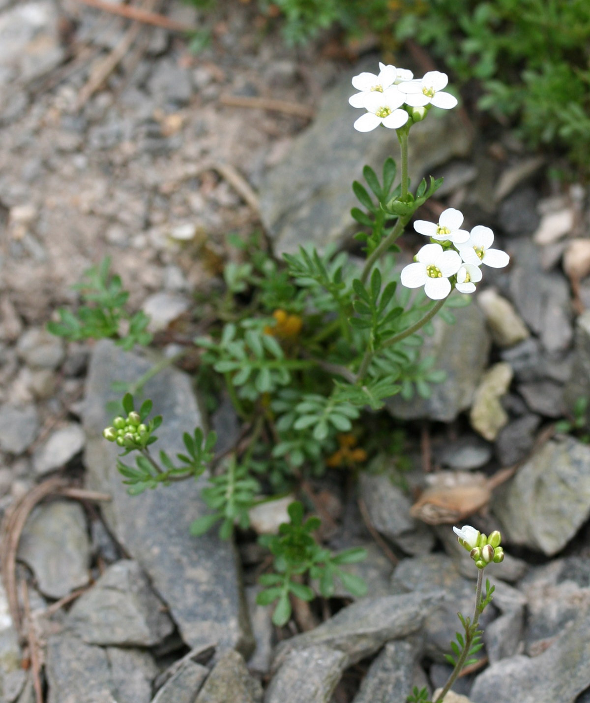 Pritzelago alpina subsp. auerswaldii im Botanischen Garten Dresden